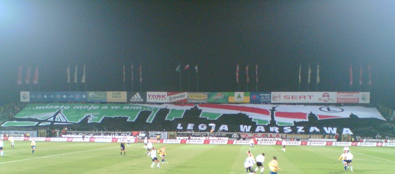 Wycięta część zdjęcia zamieszczona na wolnej licencji w Wikimedia Commons.